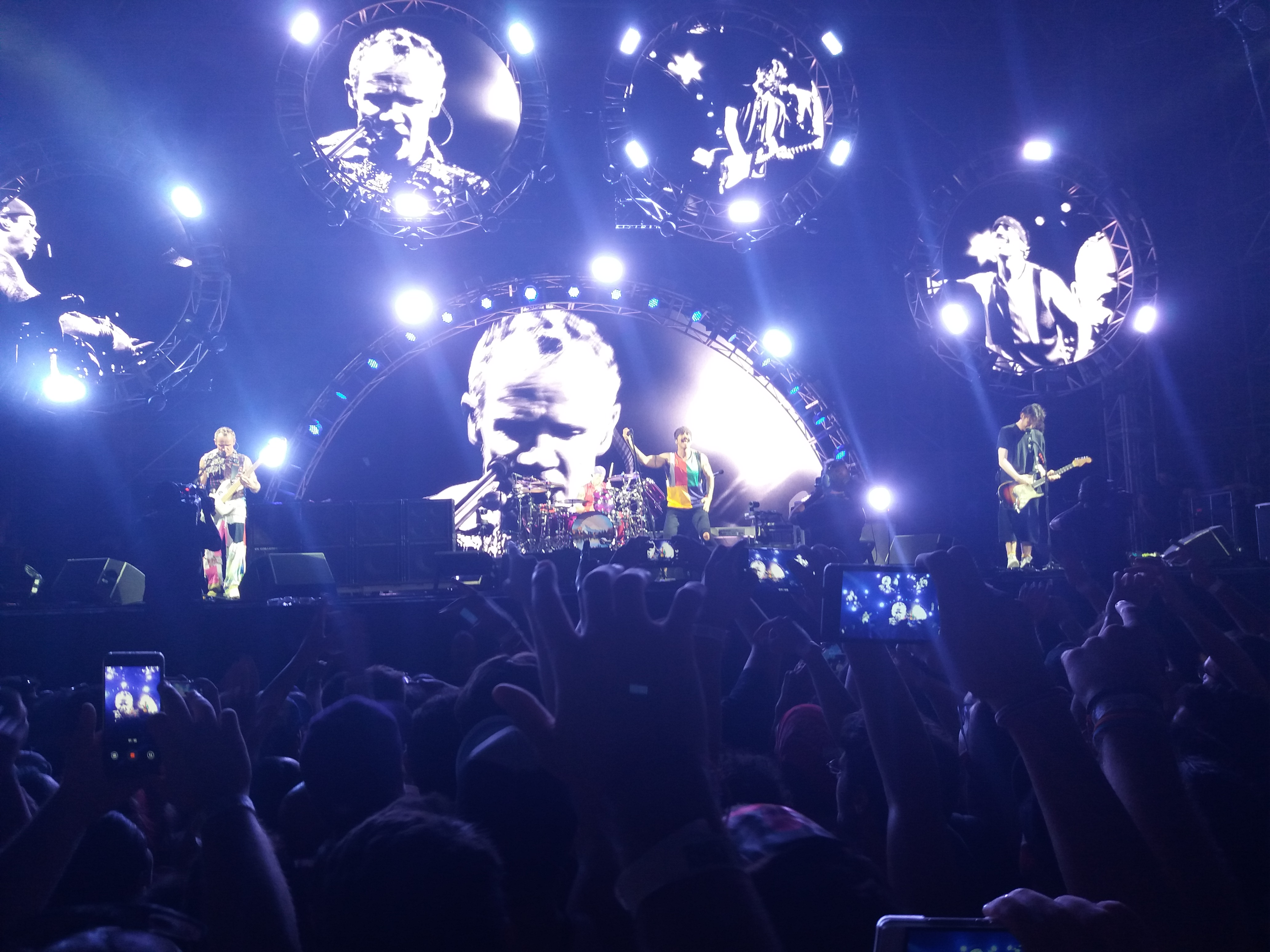 Foto concerto dei Red hot chili peppers a Roma.